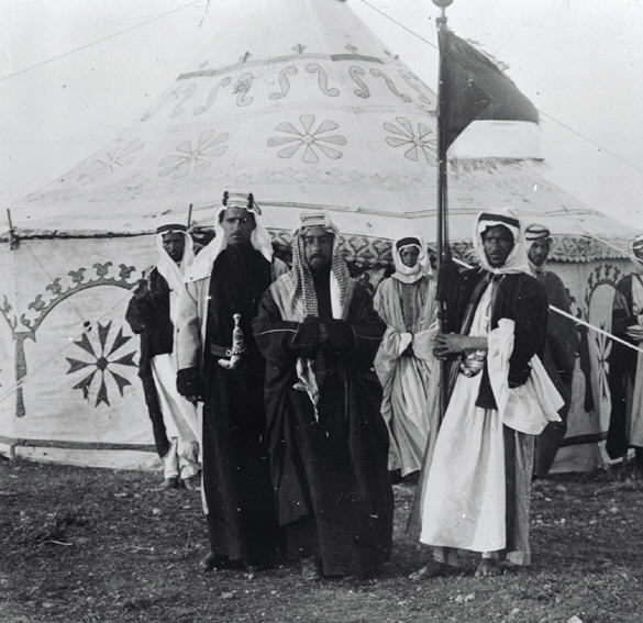 המלך עבדאללה בביקור ברבת-עמון